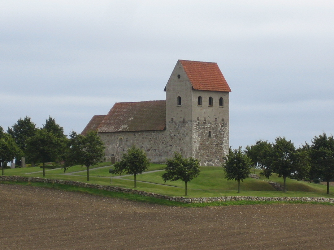 Sjörups gamla kyrka